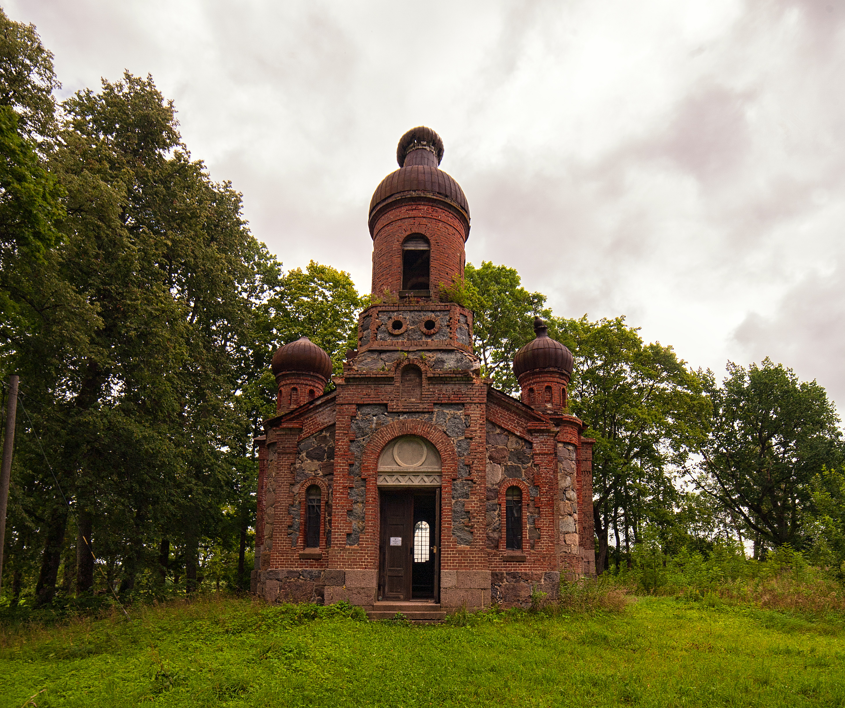 Ežu (Māļu) pareizticīgo baznīca, Skujenes pagasts